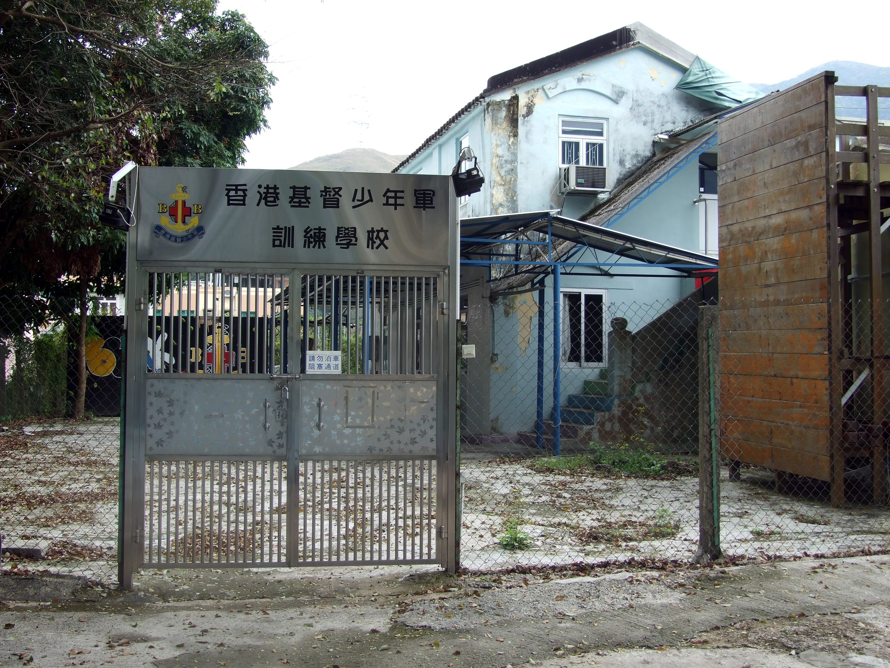 中文（香港）: 香港基督少年軍訓練學校